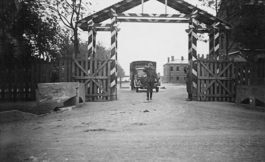 Praschnitz (Przasnysz) 1941r. Jednostka Wermachtu w koszarach.